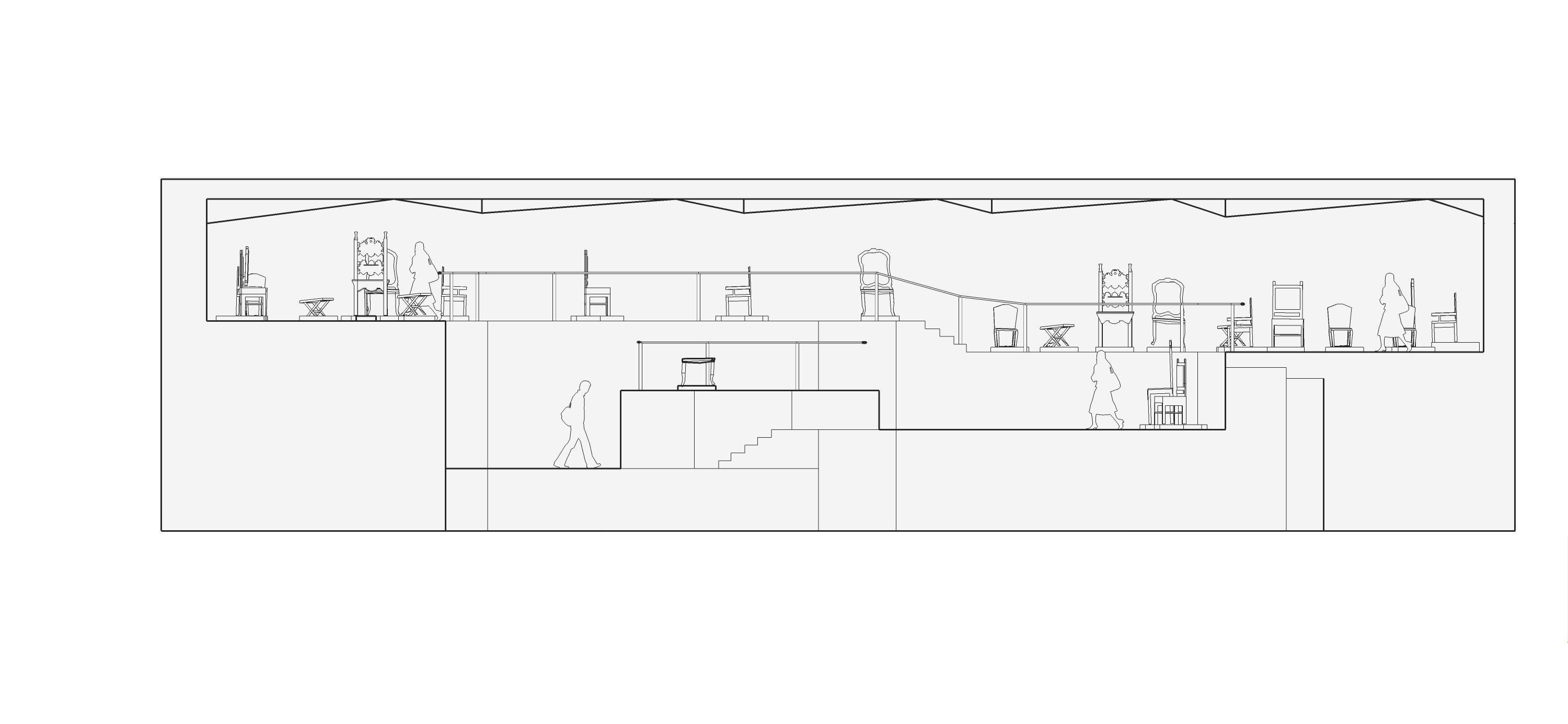 Template:Screenshotcopyrighted